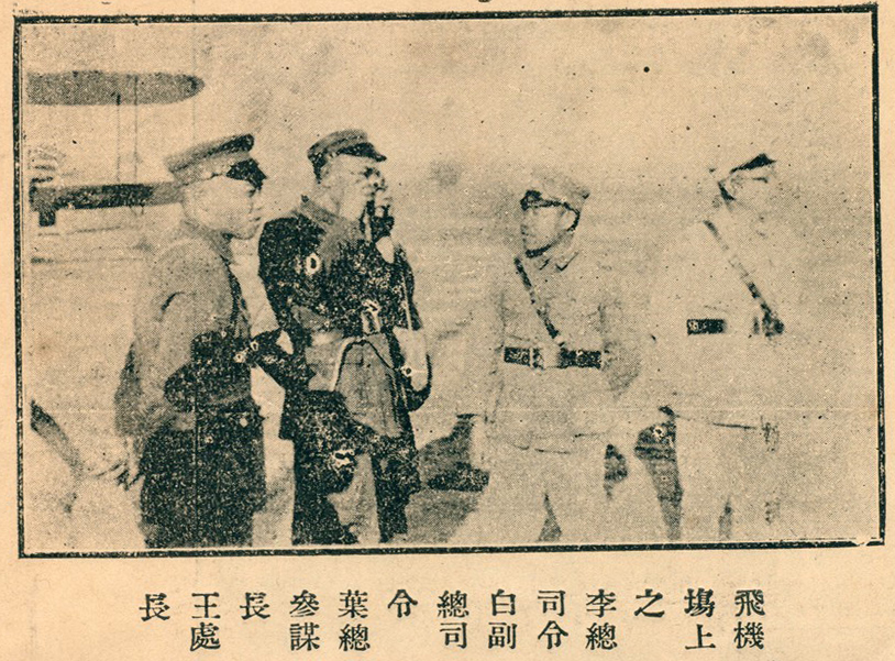 中文（台灣）: 南寧民國日報 民國廿二年元旦特刊一年來之廣西